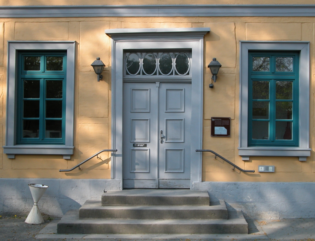 Eingangsbereich der ehemaligen Garnison-Schule in Braunschweig.